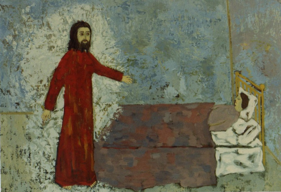 1966 oleo sobre tela